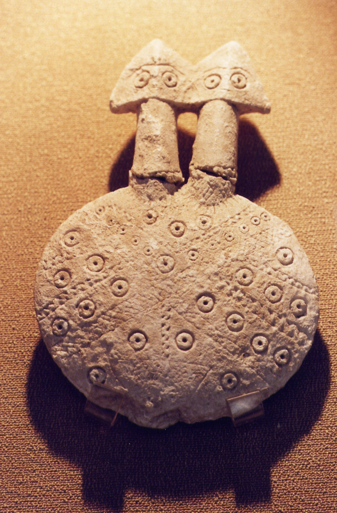 Museum für anatolische Zivilisationen, Ankara, Türkei, 3. Jahrtausend v. Chr., Idol aus Kültepe